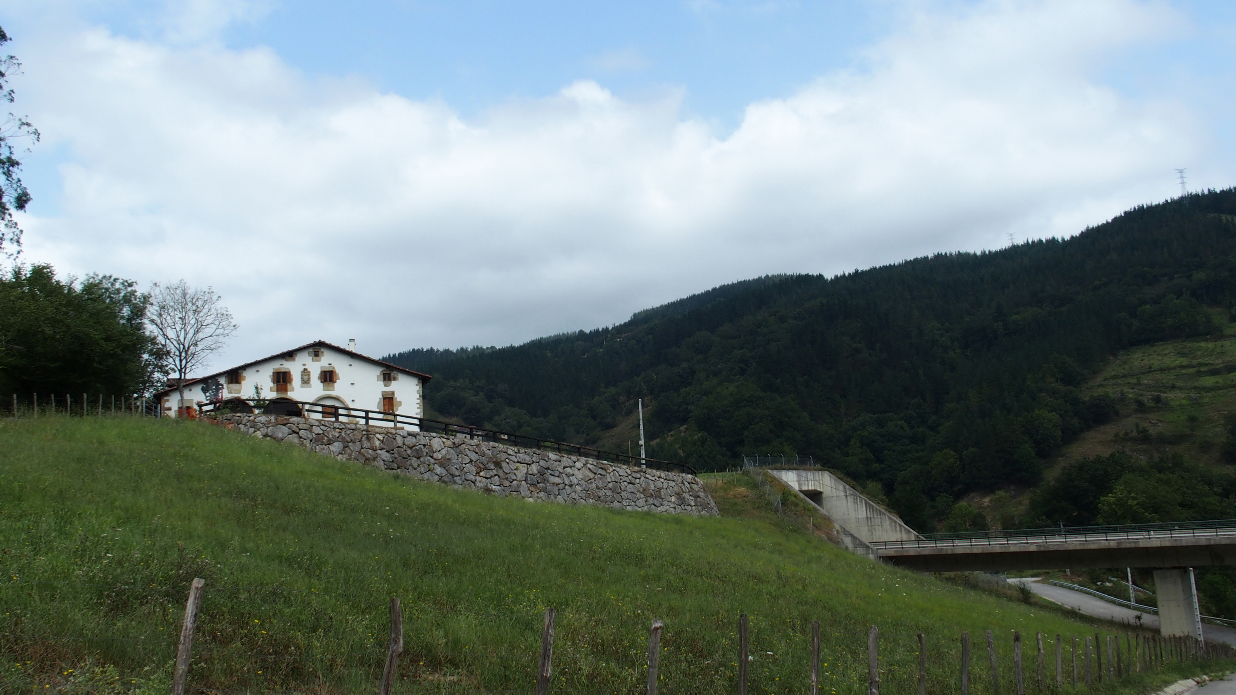 Eduegi baserria